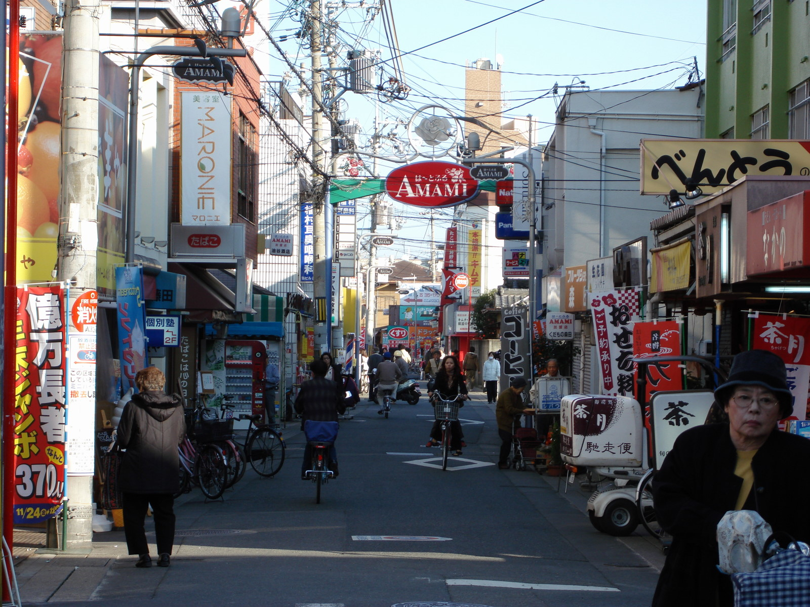 kawachiamamistreet